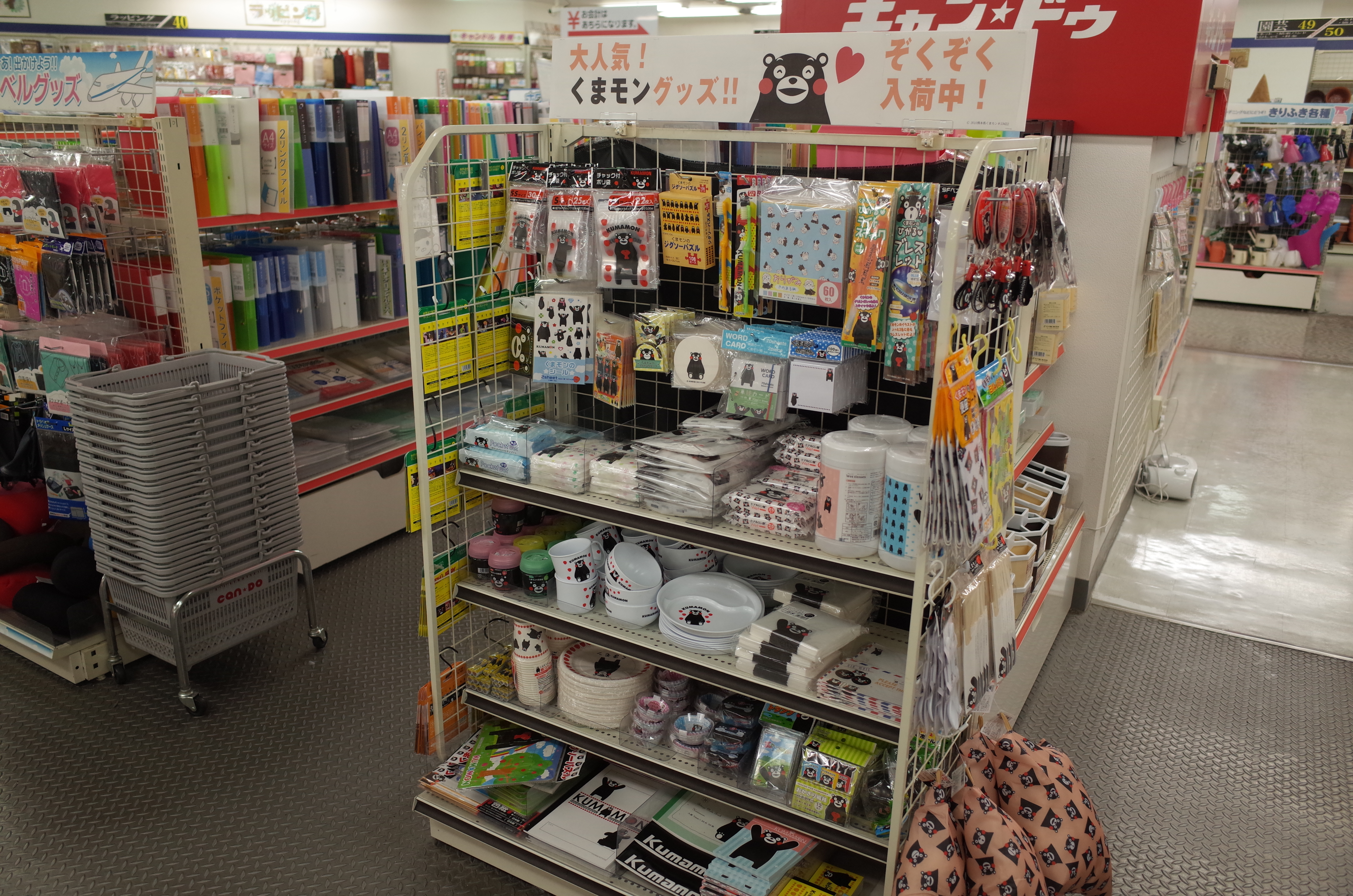 くまもん